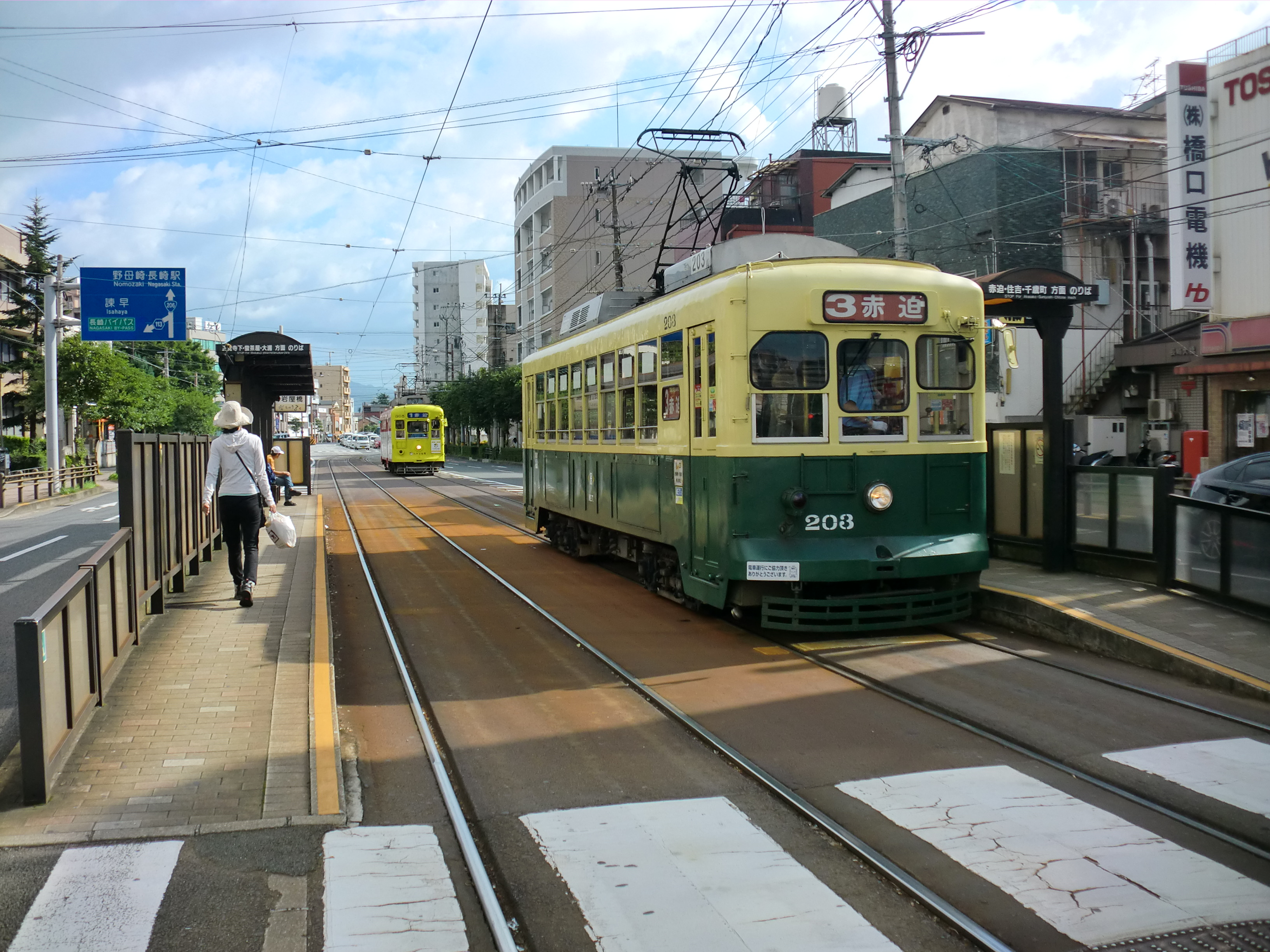 長崎電気軌道岩屋橋停留場